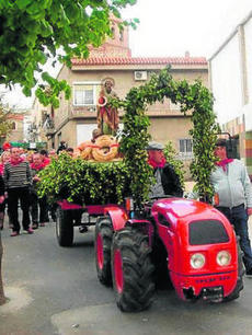 San Marcos